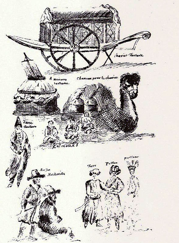 Croquis de voyage de Jacques Jubé : les chameaux et les marchands.